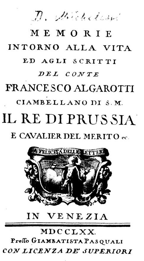 Frontespizio